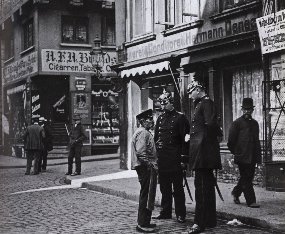 Die Polizisten Reinhold Müller (links) und Willy Jacobs (rechts) vor der Bäckerei von Hermann Denecke in der Niedernstraße 29 in Hamburg-Altstadt (Quelle: Hamburger Adressbuch von 1910), um 1910. (Quelle Datum: Quelle) .- Später: Über 40 kommunistischen, sozialdemokratischen und jüdischen Familien wurden die Wohnungen in der Fritz-Schumacher-Siedlung in Hamburg-Langenhorn gekündigt und durch NSDAP-Parteimitglieder ersetzt. Der 202 cm große, kommunalpolitisch rege Willy Jacobs aus der Straße Im Häben 31 (jetzt Immenhöven), der 1933 als Verwaltungspolizist entlassen wurde und drei Monate Einzelhaft und Folter wegen letztendlich nicht bewiesener Vorbereitung zum Hochverrat im KZ Fuhlsbüttel hinter sich hatte, reichte für alle Gekündigten eine Klage ein, konnte aber die Kündigungen nur kurz verzögern. Nach Willy Jacobs, der sich bei Kriegsende in Norwegen aufhielt und vom Polizeichef Bruno Georges zum Aufbau der Kriminalpolizei nach Hamburg geholt wurde, wurde 1986 der Willy-Jacobs-Weg in Hamburg-Langenhorn benannt. Siehe auch: Willy-Jacob-Weg bei W-Straßenverzeichnis, auf der Website langenhorn-archiv.de.